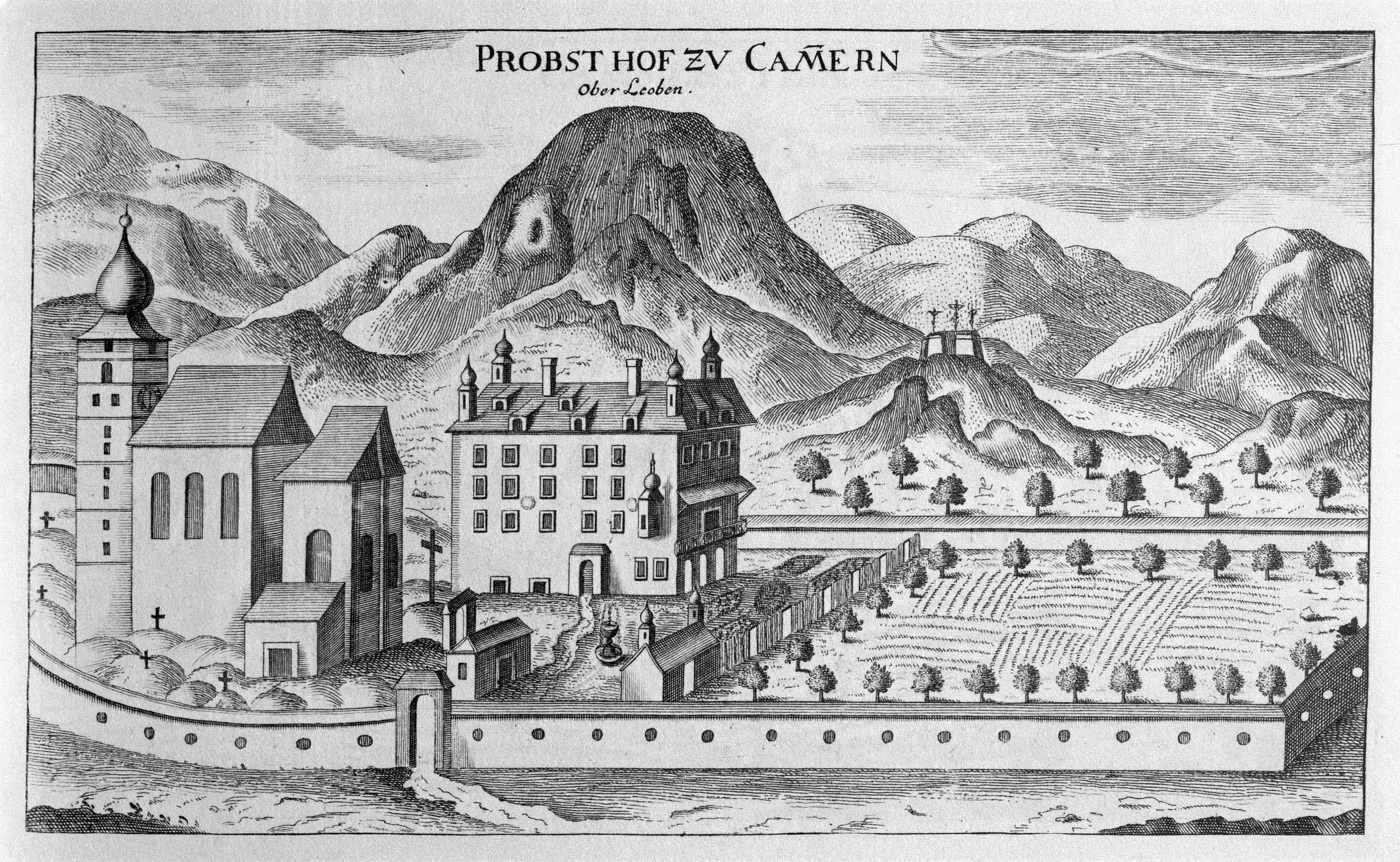 G. M. Vischers Käyserlichen Geographi, Topographia Ducatus Stiriae, Das ist: Eigentliche Delineation / und Abbildung aller Städte / Schlösser / Marcktfleck / Lustgärten / Probsteyen / Stiffter / Clöster und Kirchen / so es sich im Herzogthumb Steyrmarck befinden; Und anjetzo Umb einen billichen Preyß zu finden seynd Bey Johann Bitsch Universitäts Buchhandlern / Auff dem Juden=Platz bey der guldenen Saulen. Graz 1681 Die Nummerierung der Dateien folgt der alphabetischen Reihung der Ortsnamen